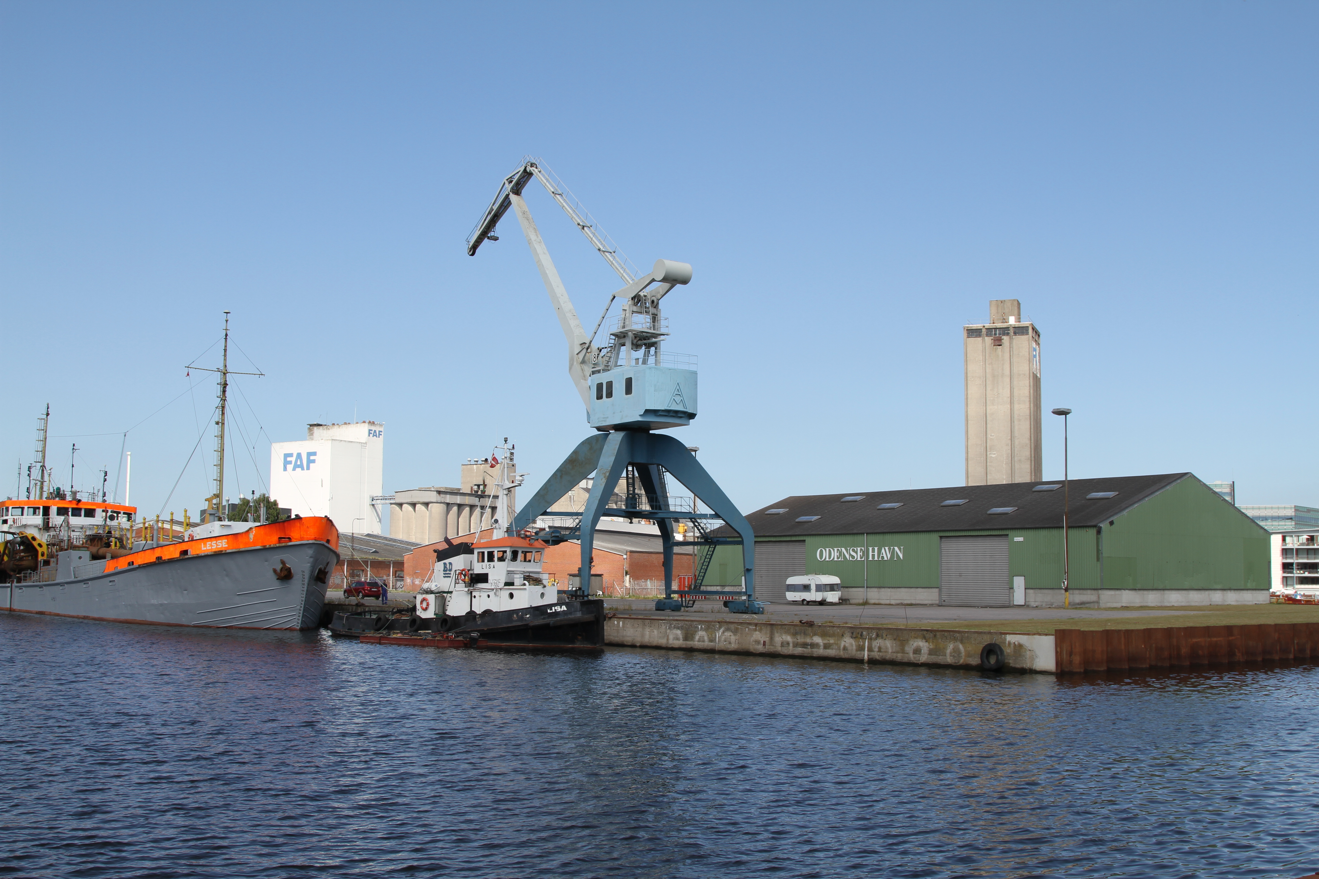 Industri i Odense Indre Havn / Industry in Odense Inner Harbour, Funen, Denmark